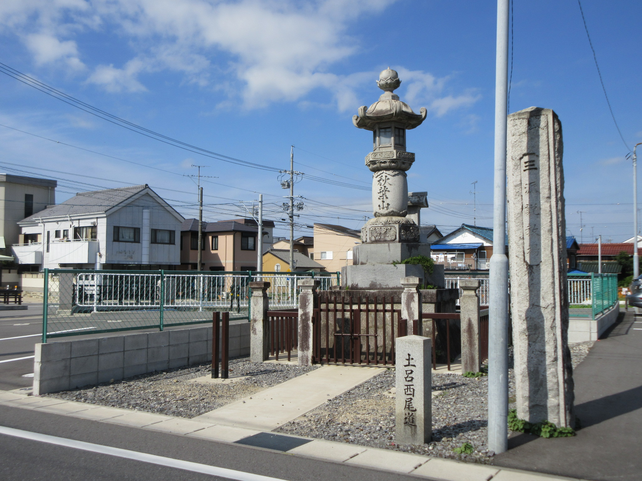 愛知県道43号岡崎碧南線沿い。岡崎市福岡町玉川橋交差点付近。